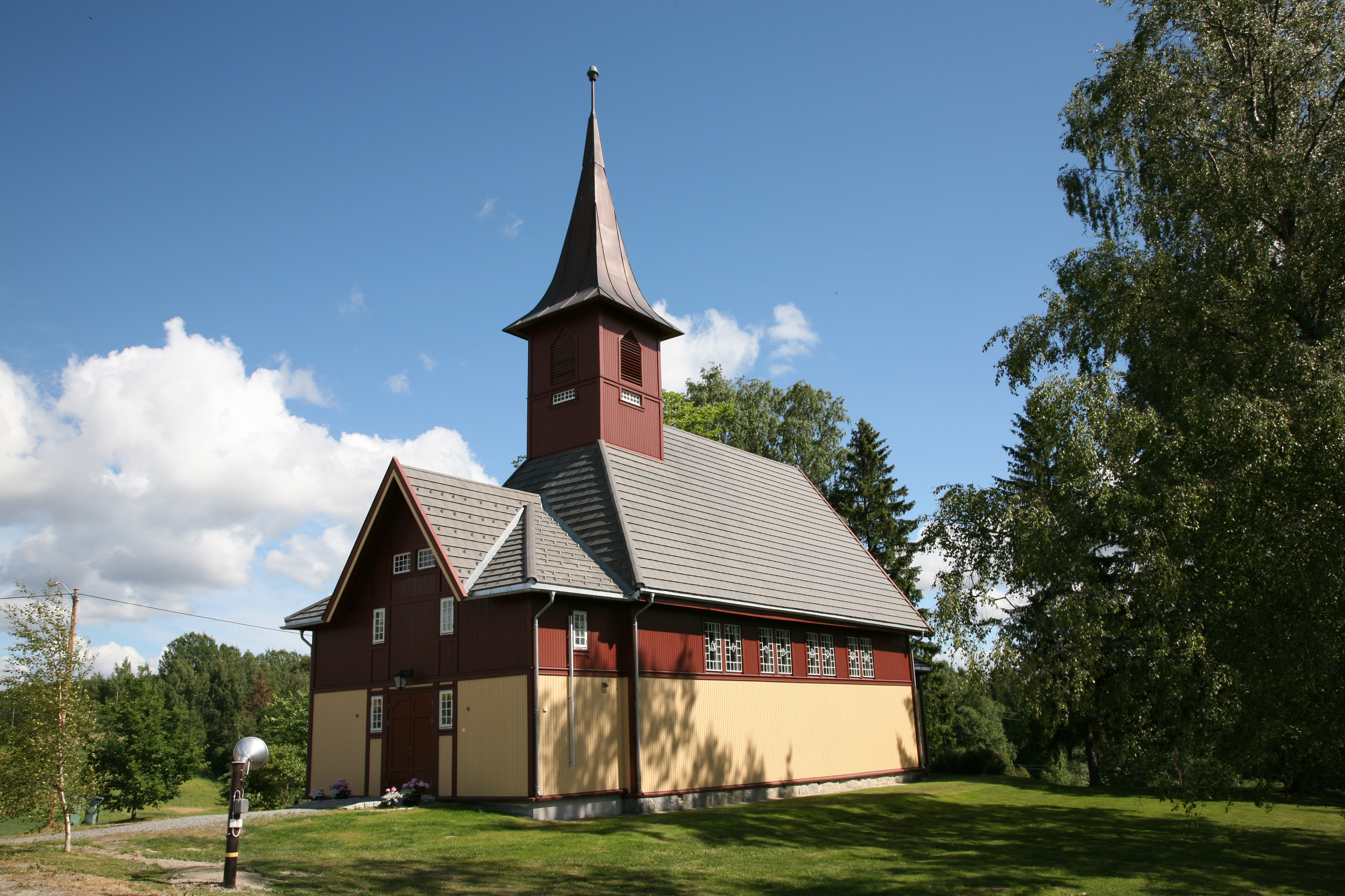 Dalen church in Fet, Akershus, Norway